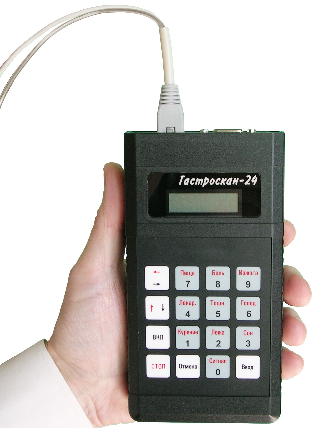 Acidogastromonitor